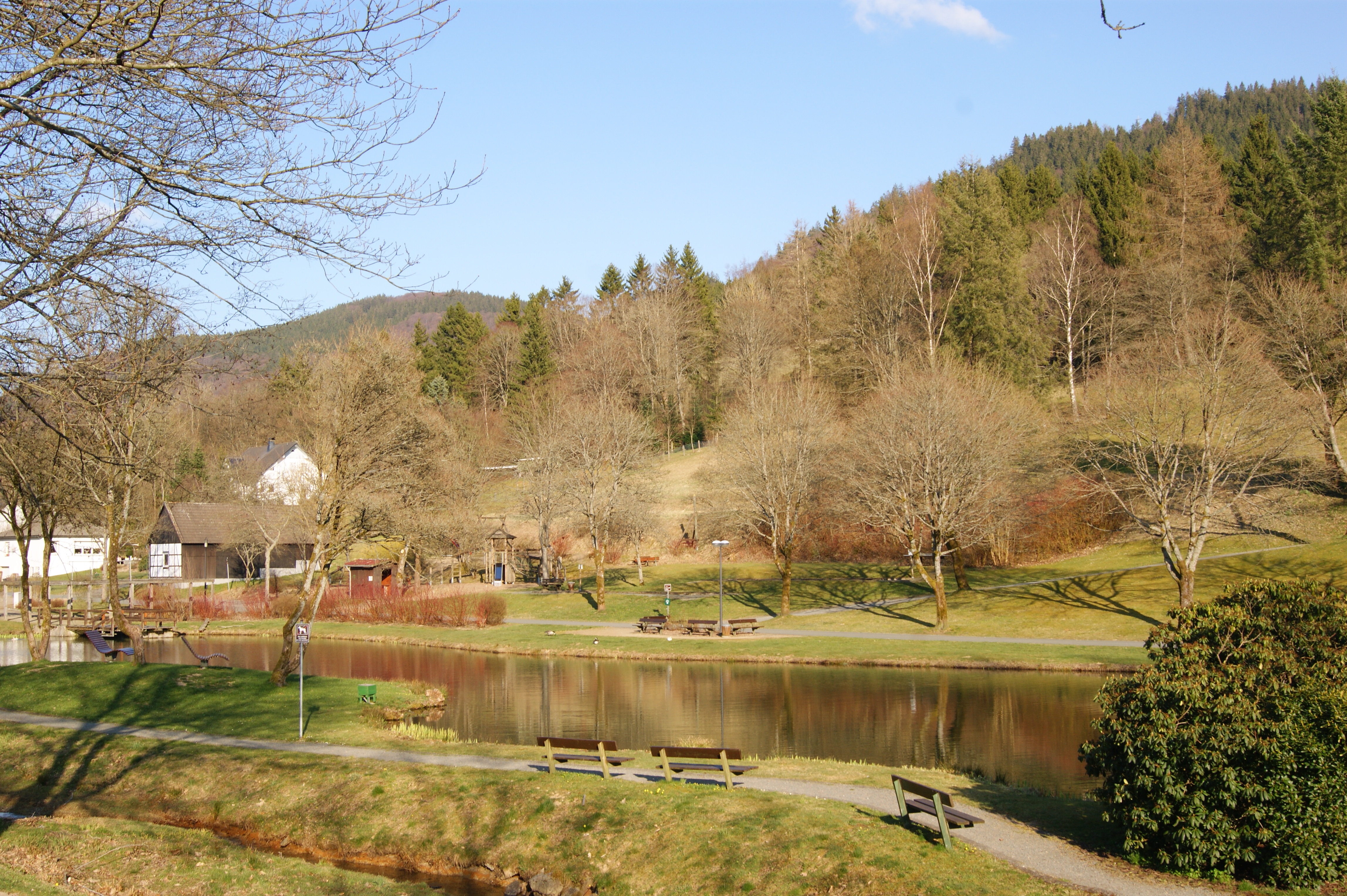 Blick auf den See